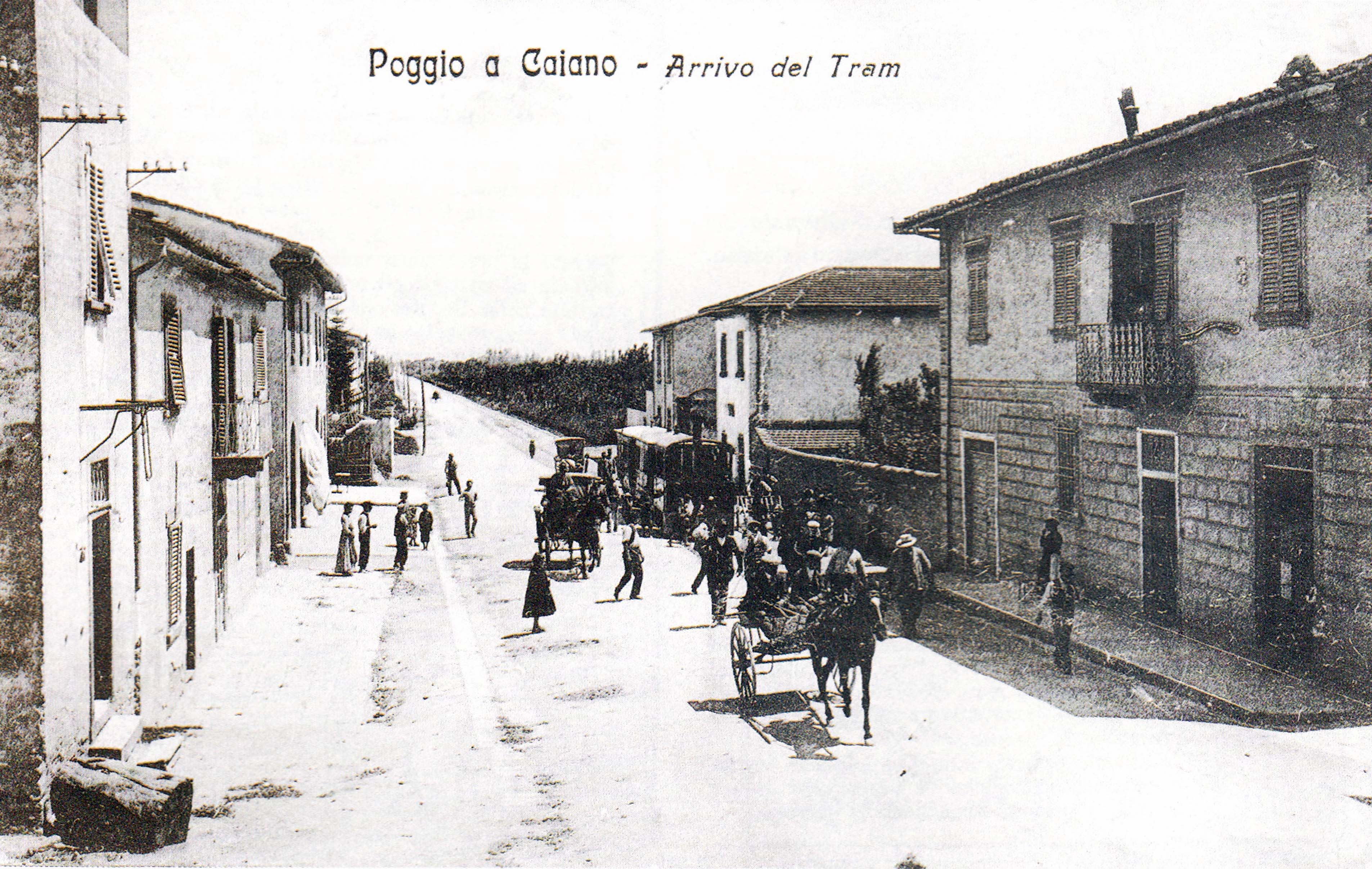 Pressi del ponte sull'Ombrone, capolinea della tranvia per Poggio a Caiano